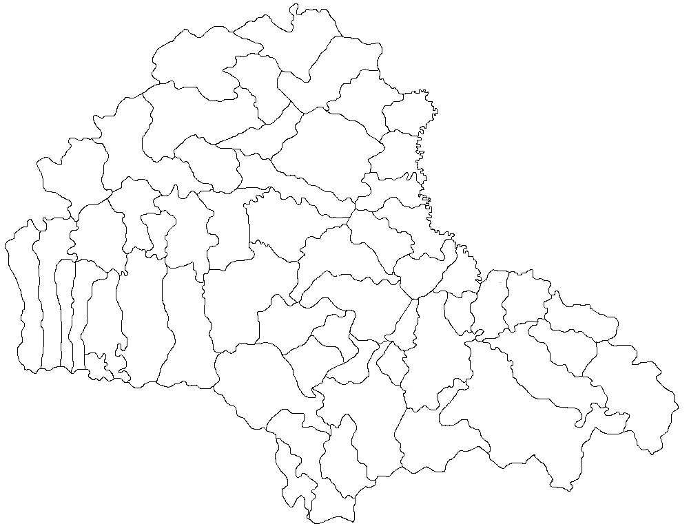 Categorie:Hărţi ale judeţului Braşov